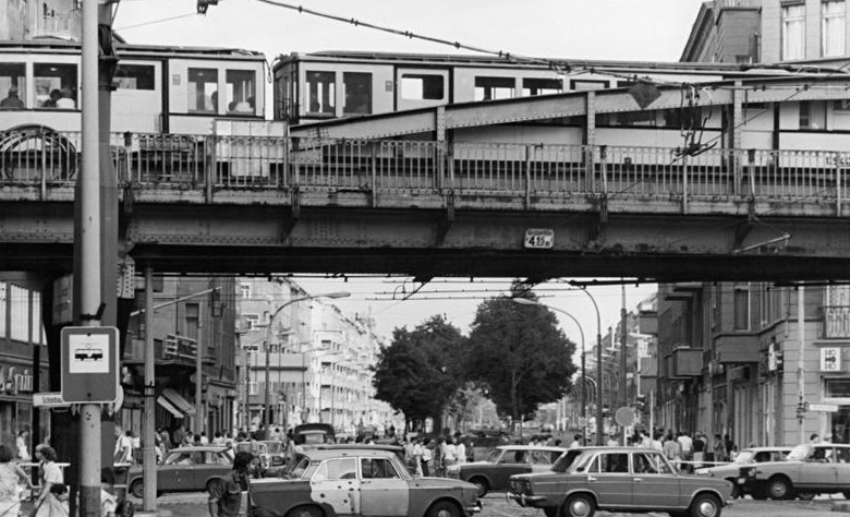 Berlin, Dimitroffstraße, S-Bahn/richtig ist: U-Bahnhof ADN-ZB Kaufhold 15.8.80 Berlin: Der Puls der Großstadt schlägt in der Schönhauser Allee Ecke Dimitroffstraße besonders kräftig.